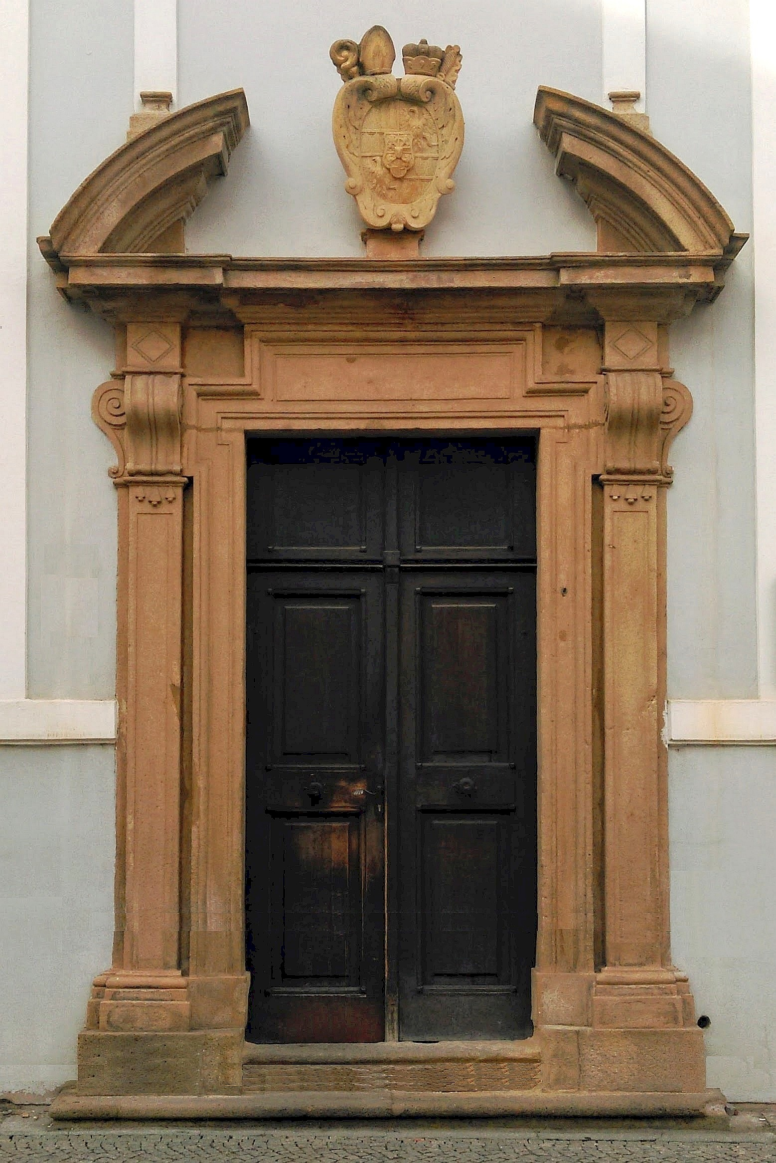 Chlapecký zpěvácký seminář, Jánská 27/10, Pilařova, Kroměříž. Vstupní portál